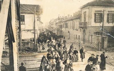 Uscita degli operai dalle fabbriche (Busto Arsizio)